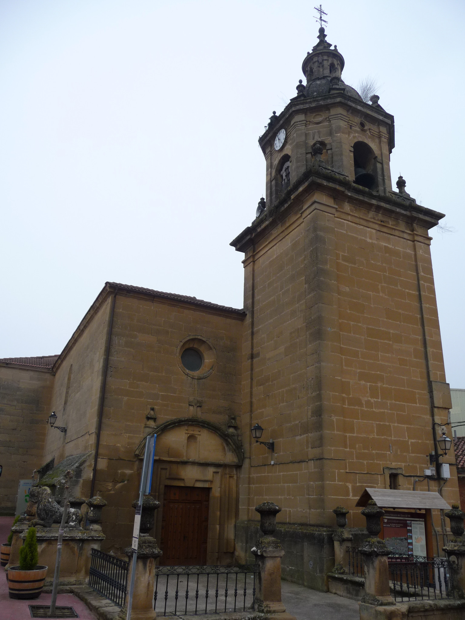 Iglesia parroquial de Ntra. Sta. de la Antigua - Baños de Ebro.